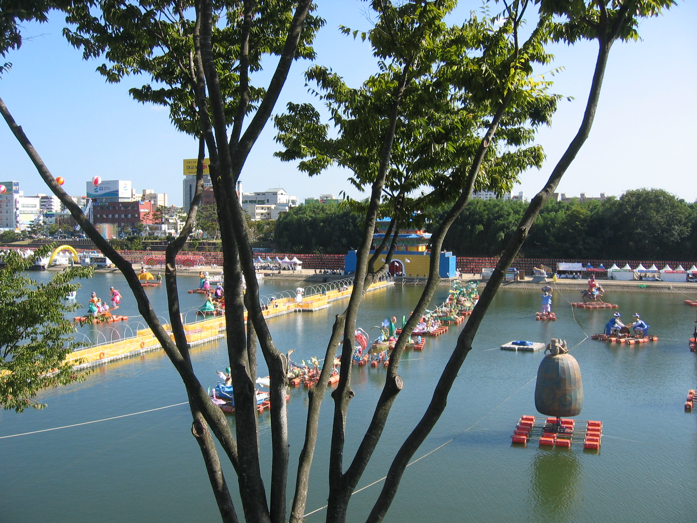 2006년 추석 명절 기간 중 경상남도 진주시 남강에서 열려진 "한국 드라마 페스티벌"의 모습 The scenery of "Korea Drama Festival" being held on Nam River in Jinju, Gyeonsangnam-do, South Korea during Chuseok holidays.